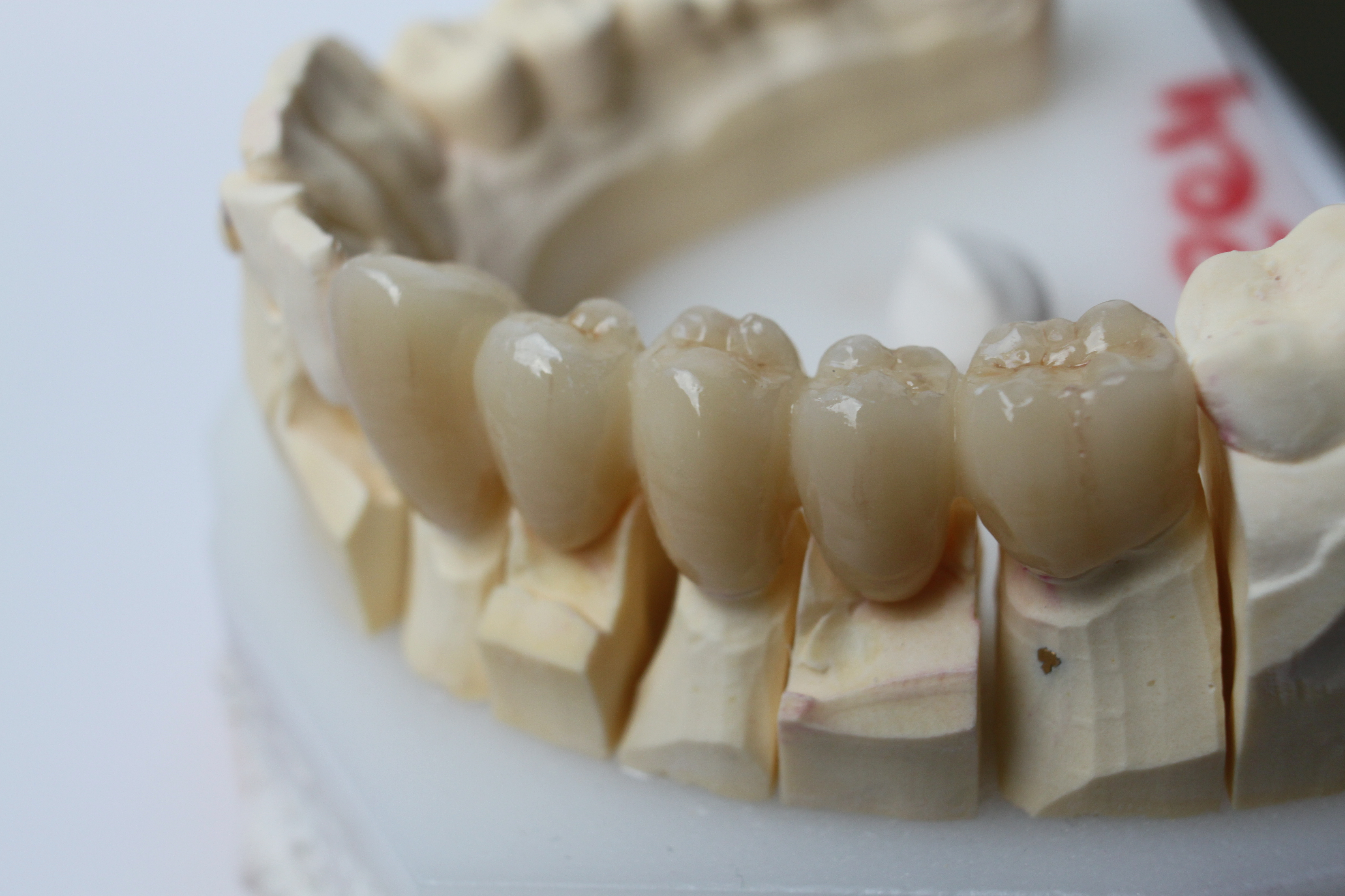 Metallfreie Brücke Zirkoniumdioxid